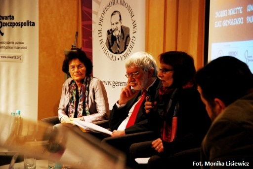 Konferencja: "Wolność słowa a język nienawiści" Warszawa, 6 marca 2012, BuW n/z: Paula Sawicka, Jacques Dewitte, Elke Gryglewski, Konstanty Gebert photo: Monika Lisiewicz